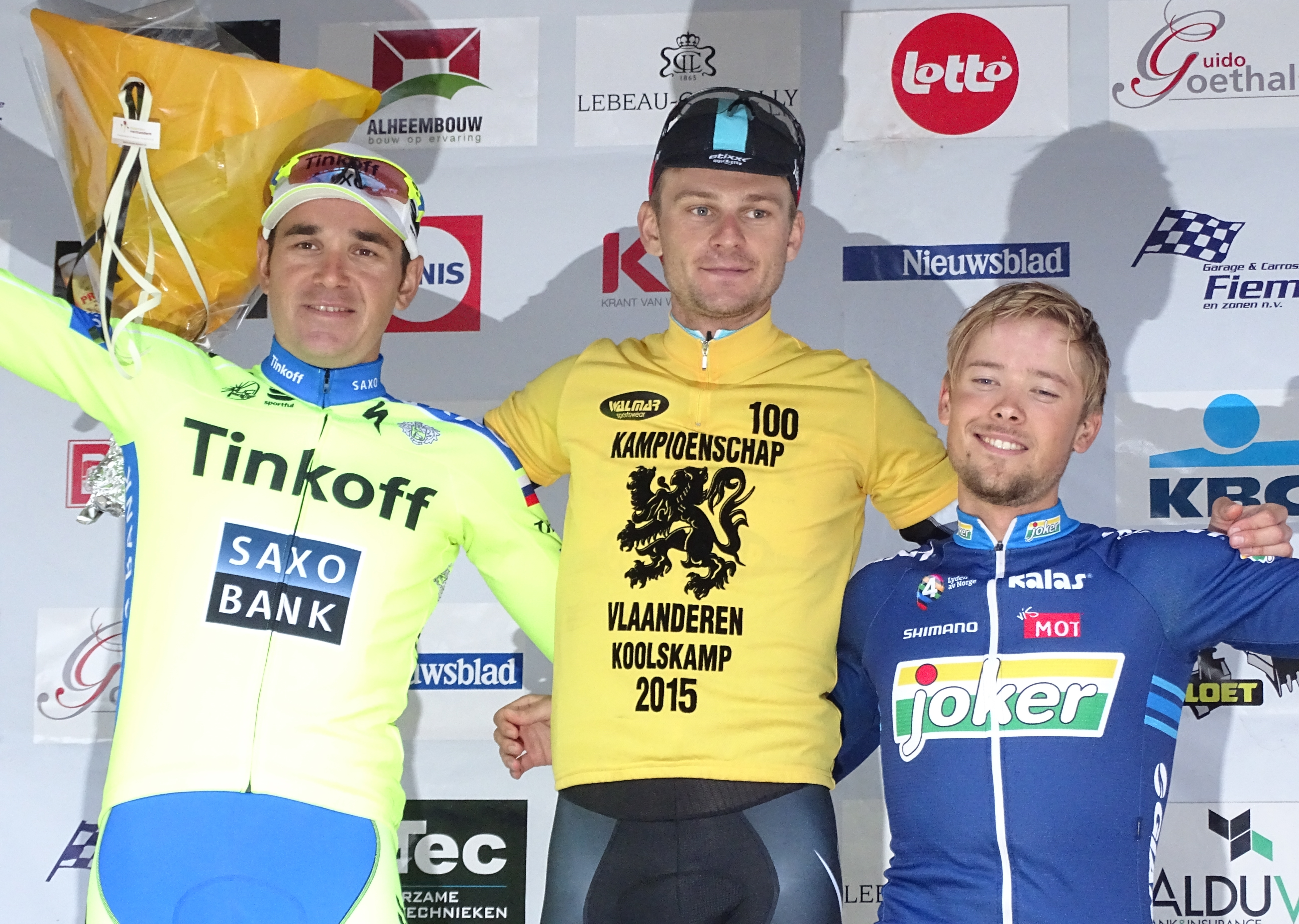 Reportage réalisé le vendredi 18 septembre à l'occasion de l'arrivée du Championnat des Flandres 2015 à Koolskamp (Ardooie), Belgique.